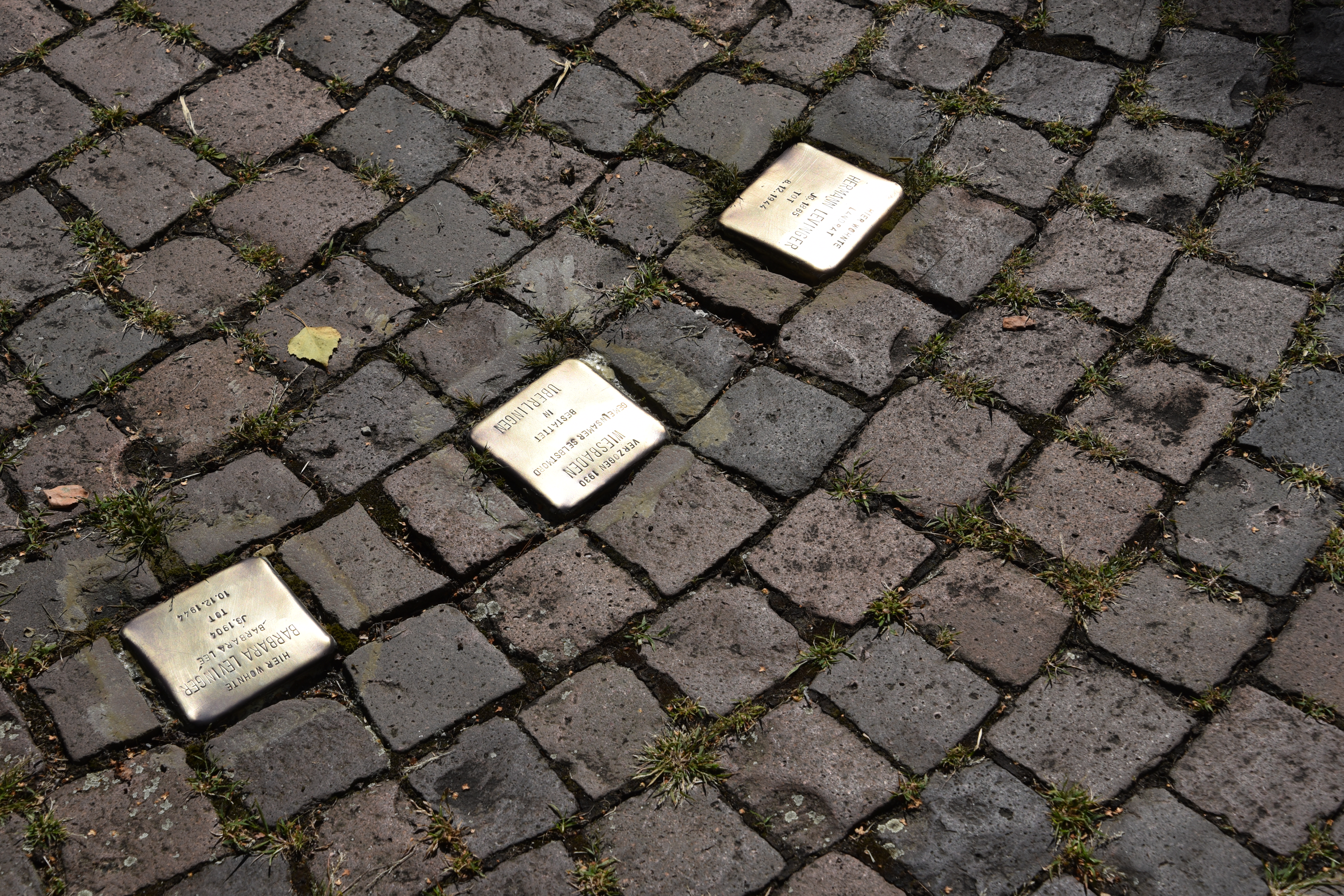 Stolpersteine für Familie Levinger in Überlingen